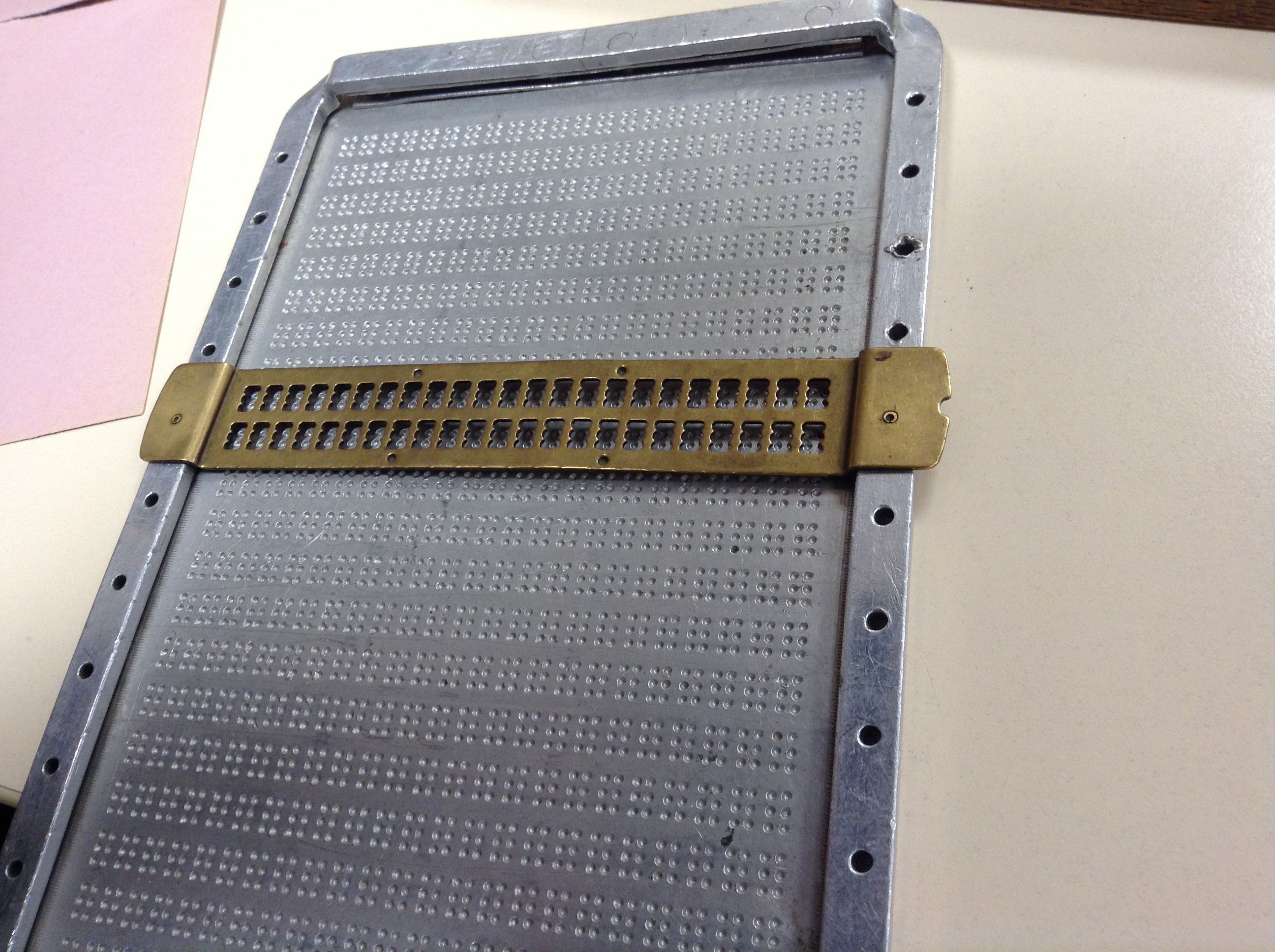 Tablette pour écrire le braille avec un poinçon.